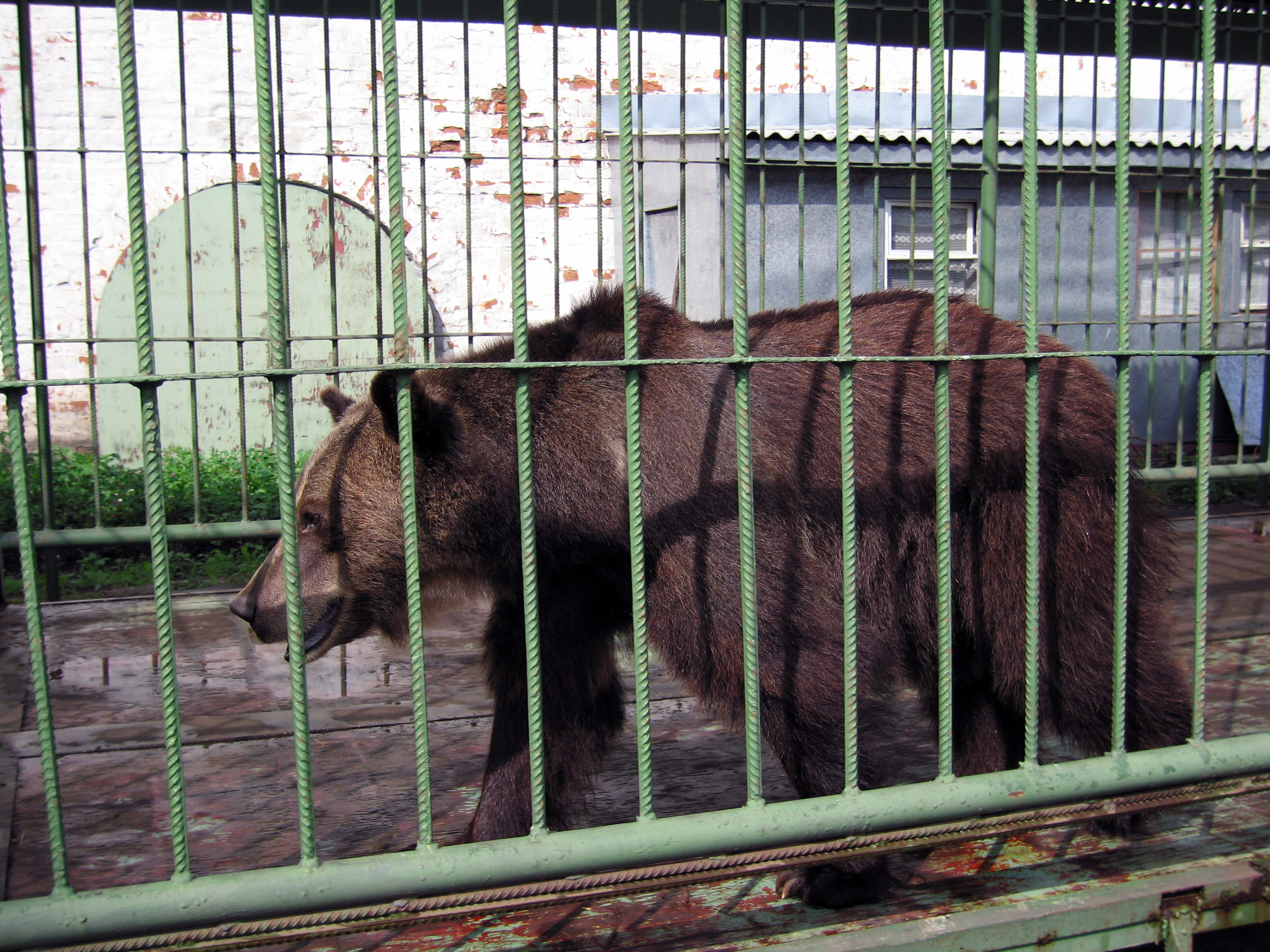 Masha, das Maskottchen der russischen Stadt Jaroslawl